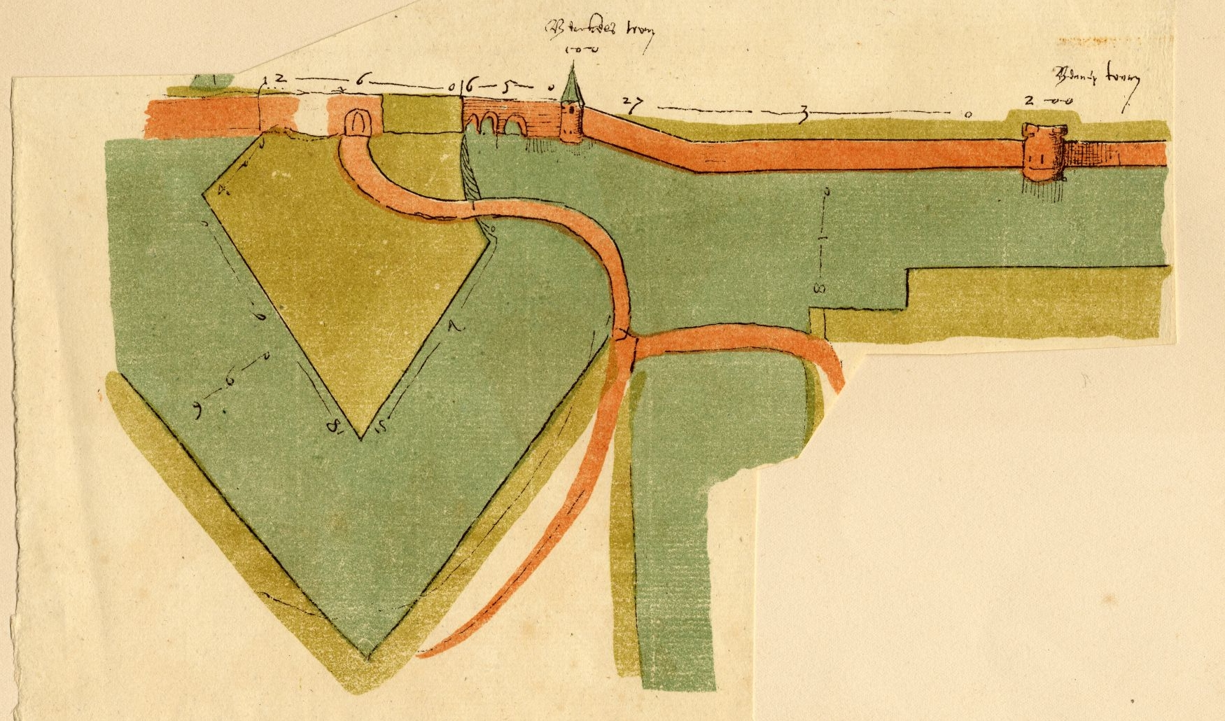 Kaart met plattegrond van Leiden, met de Hogewoerdspoort, exterieur landzijde ter hoogte van de Kraaierstraat, Bolwerkstraat. Losbladige verzameling litho's in kleur door T. Hooiberg naar de kaarten van Salomon Davidsz van Dulmanhorst en Jan Pieterssoon Dou, uit: Chaertbouc van Straten binnen deser Stadt Leyden, met vermelding van de straat- en perceelbreedten en van de eigenaars van de percelen (1588-1597) en Chaertbouc van de Stadts Wateren, met opgave van de minimaal vereiste breedten, de breedten van de aanliggende percelen en de eigenaars daarvan (1583-1589), gemaakt voor W. Pleyte, Leiden voor 300 jaren en thans, 1874.